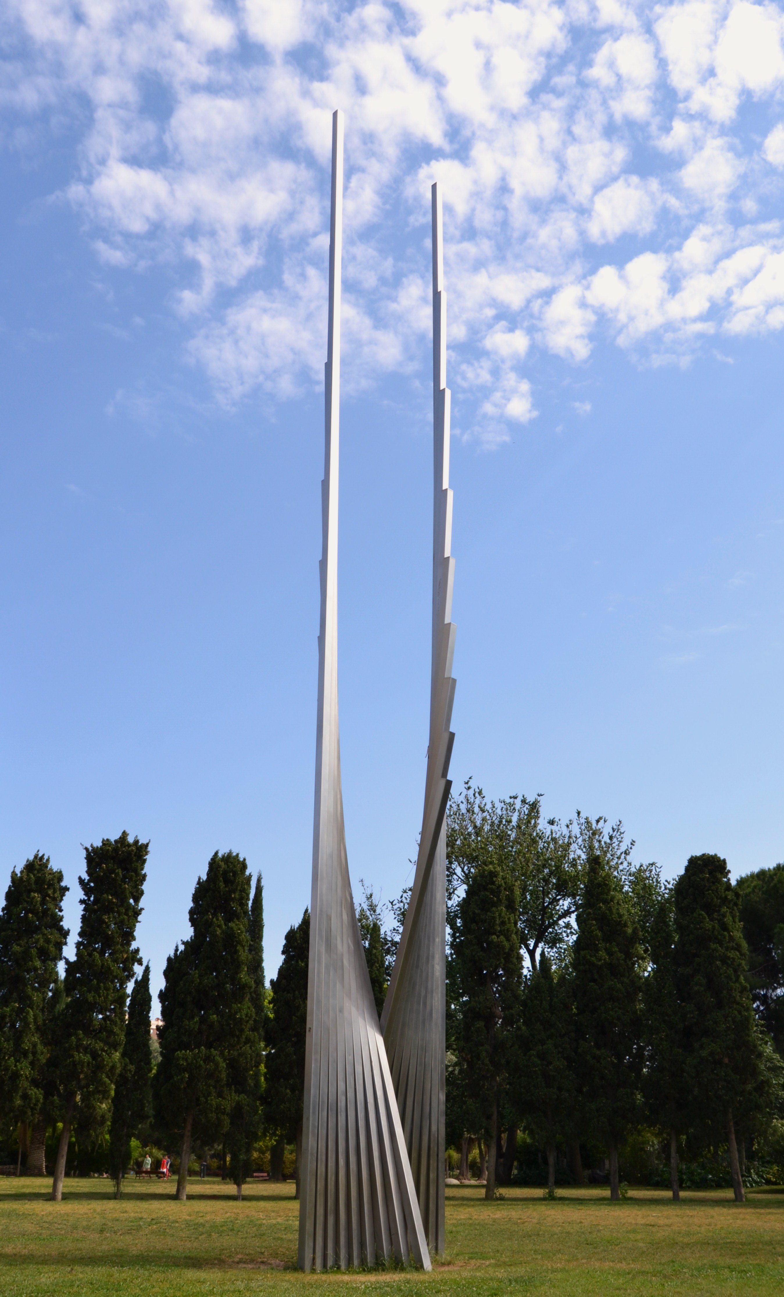 Monument a Ausiàs Marc, Andreu Alfaro, jardí de Vivers de València.